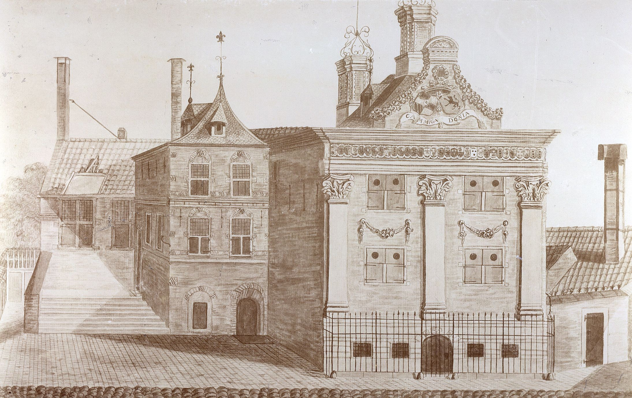 Ljouwert: It Amelânhûs oan de Foarstreek yn 1781